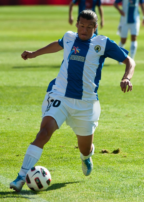 El jugador valencianista Nelson Valdez